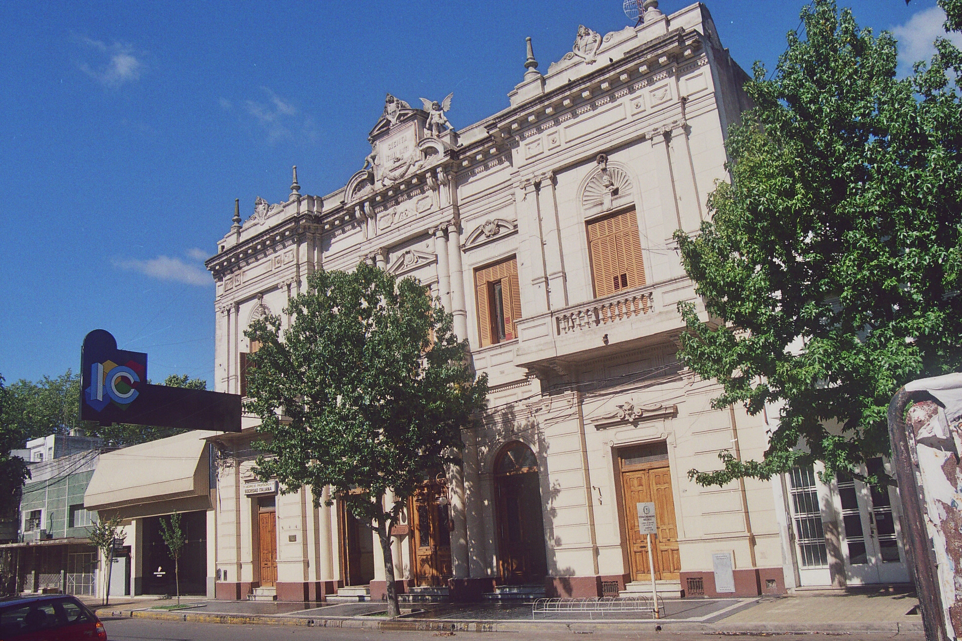 Edificio de la Sociedad Italiana de Junín, Argentina. Allí funcionan también dependencias de Canal 10 de televisión.